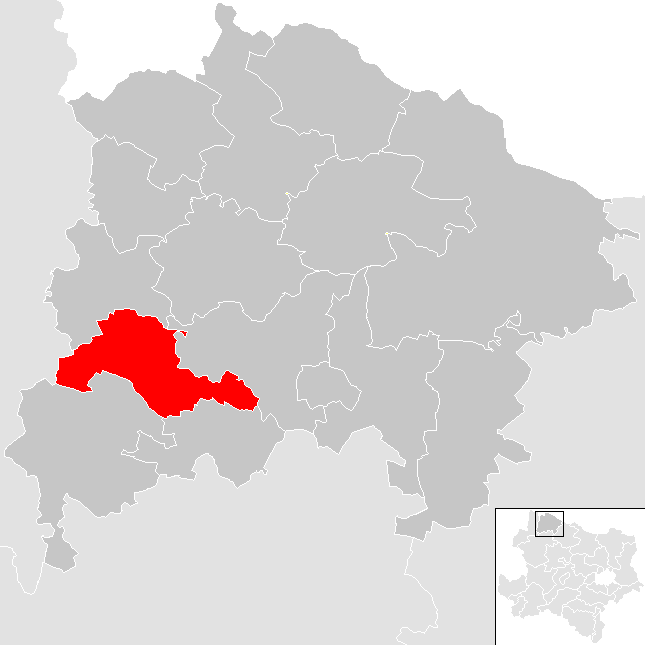 Bezirk Waidhofen an der Thaya